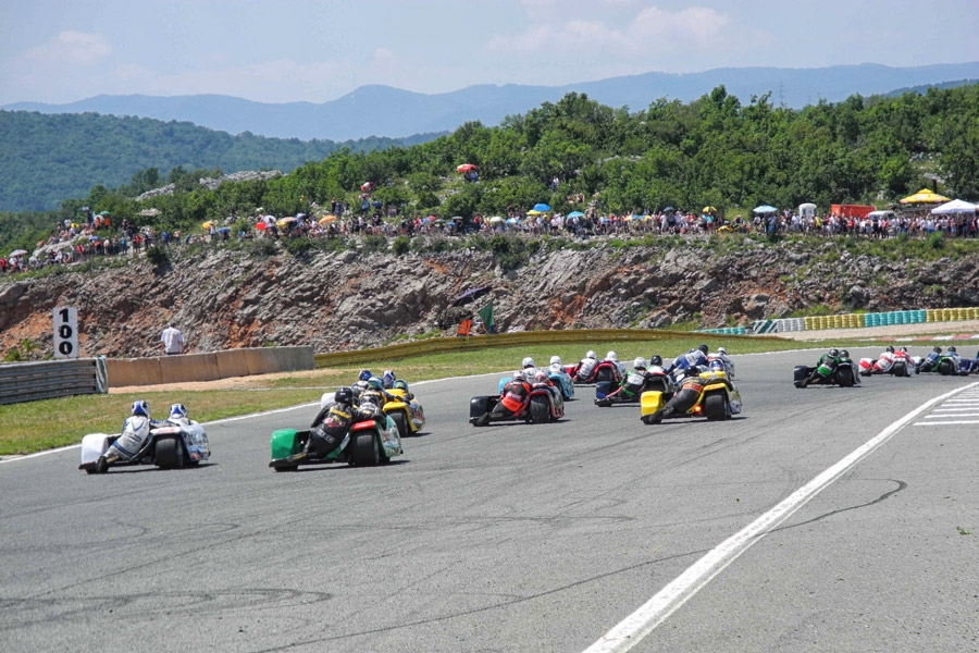 Svjetsko prvenstvo motocikala s prikolicom "CROATIA OSIGURANJE FIM Sidecar World Championship 2013." na automotodromu Grobnik.